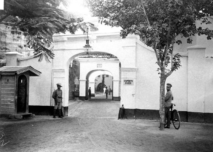 Repronegatief. Hoofdingang van Fort Rotterdam te Makassar